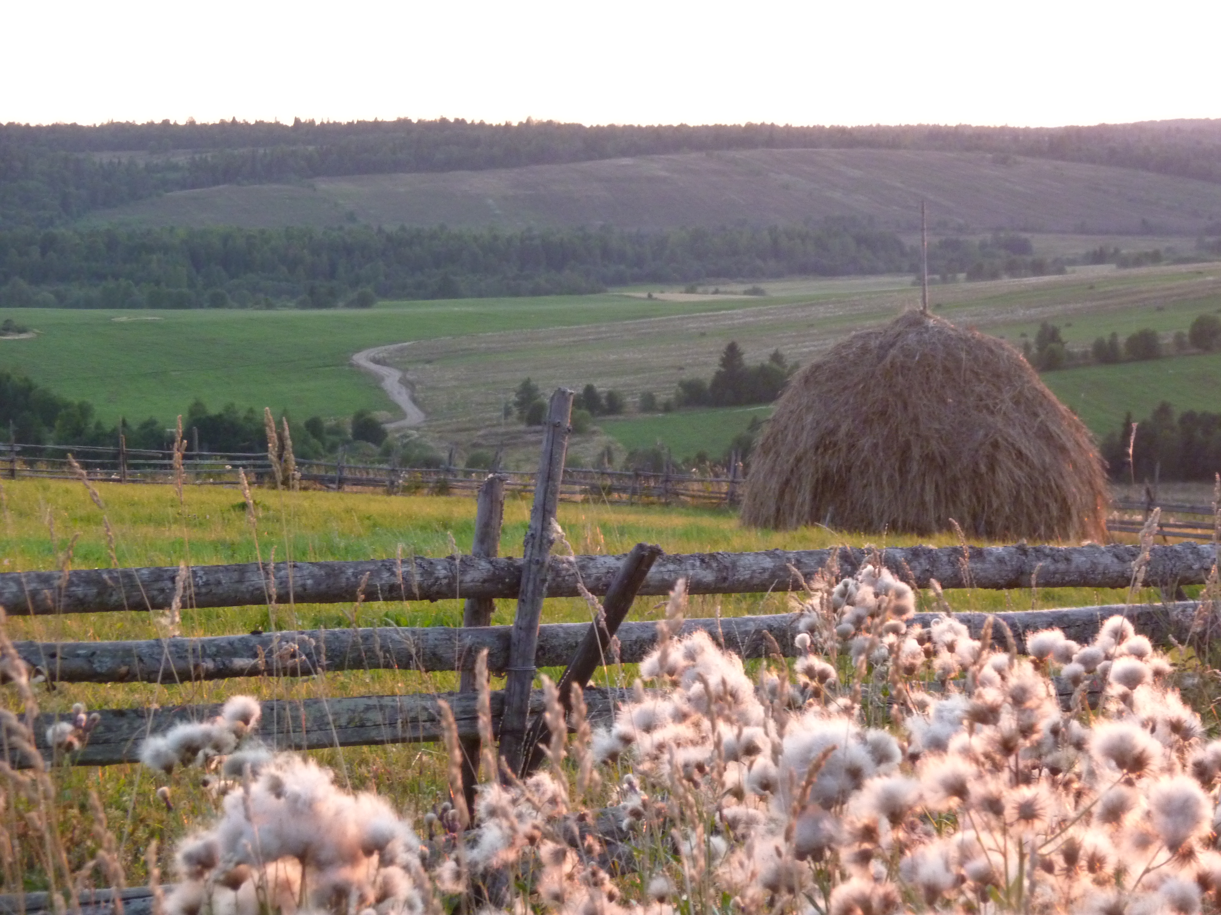 Исакова гора, Бабушкинский район This image is related to the protected area of Russia number 3510018